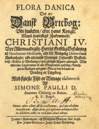 Titel der Flora Danica 1648 des Simon Pauli der Jüngere (1603-1680). Quelle: Server der Universität Kopenhagen